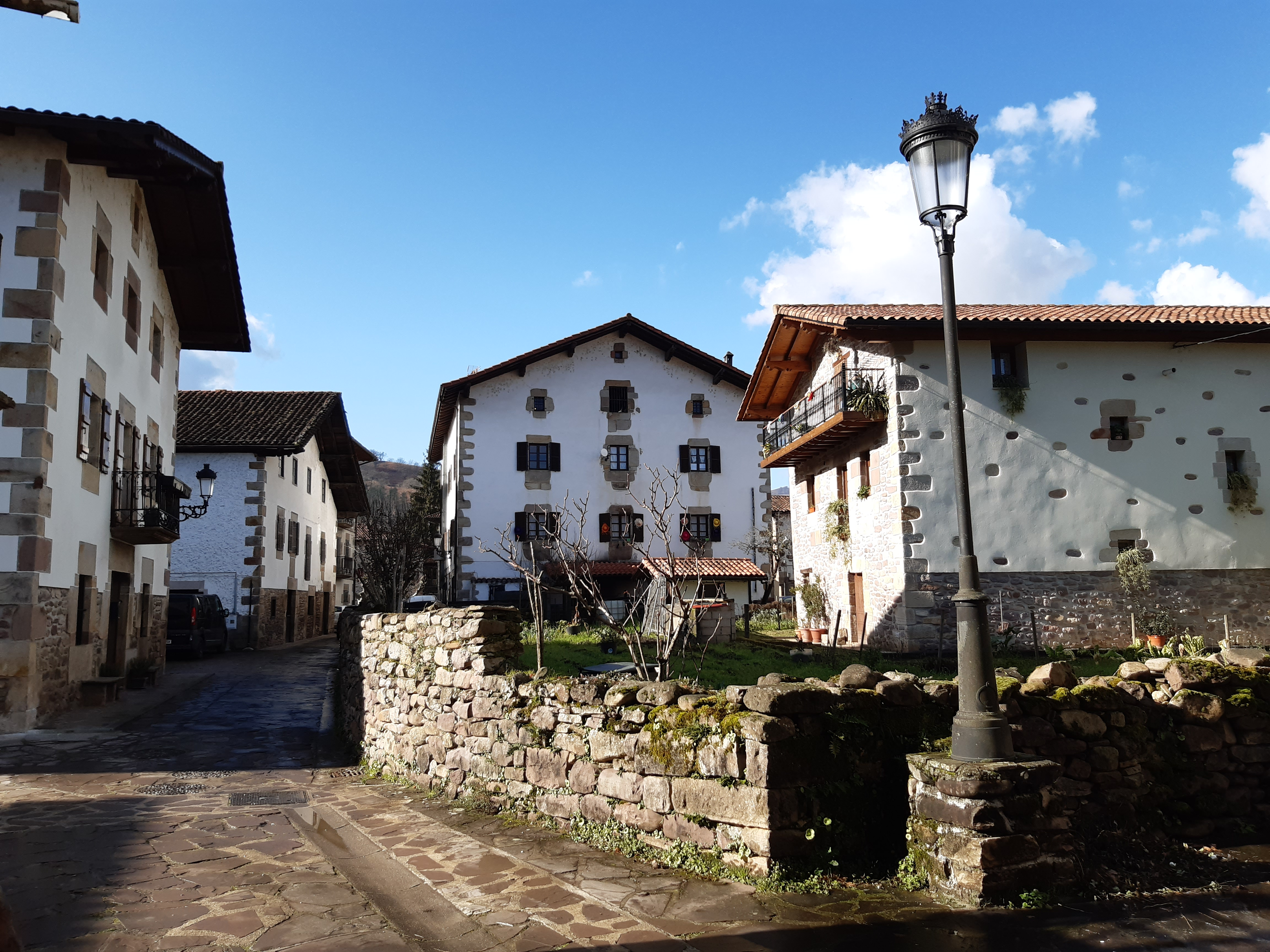 Etxeak eta jauregiak, Ituren, Malerreka, Nafarroa, Euskal Herria